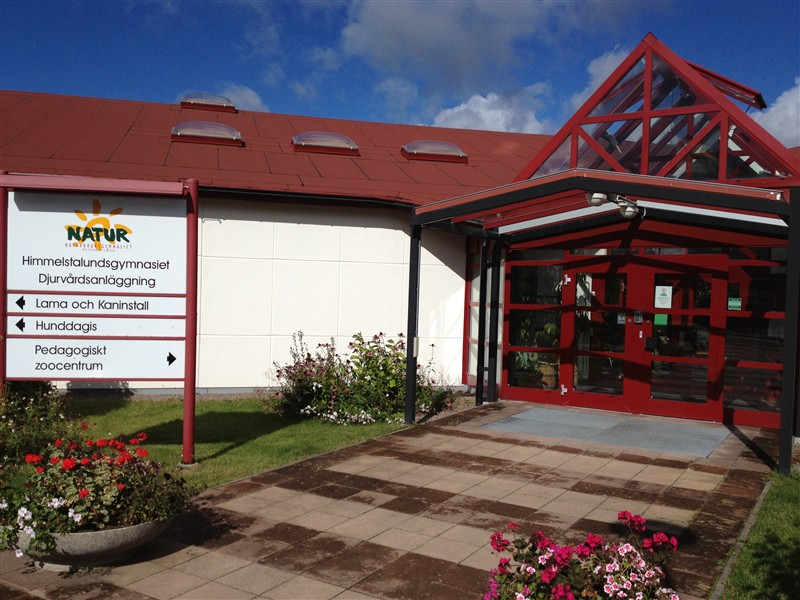 Entré till djurhuset